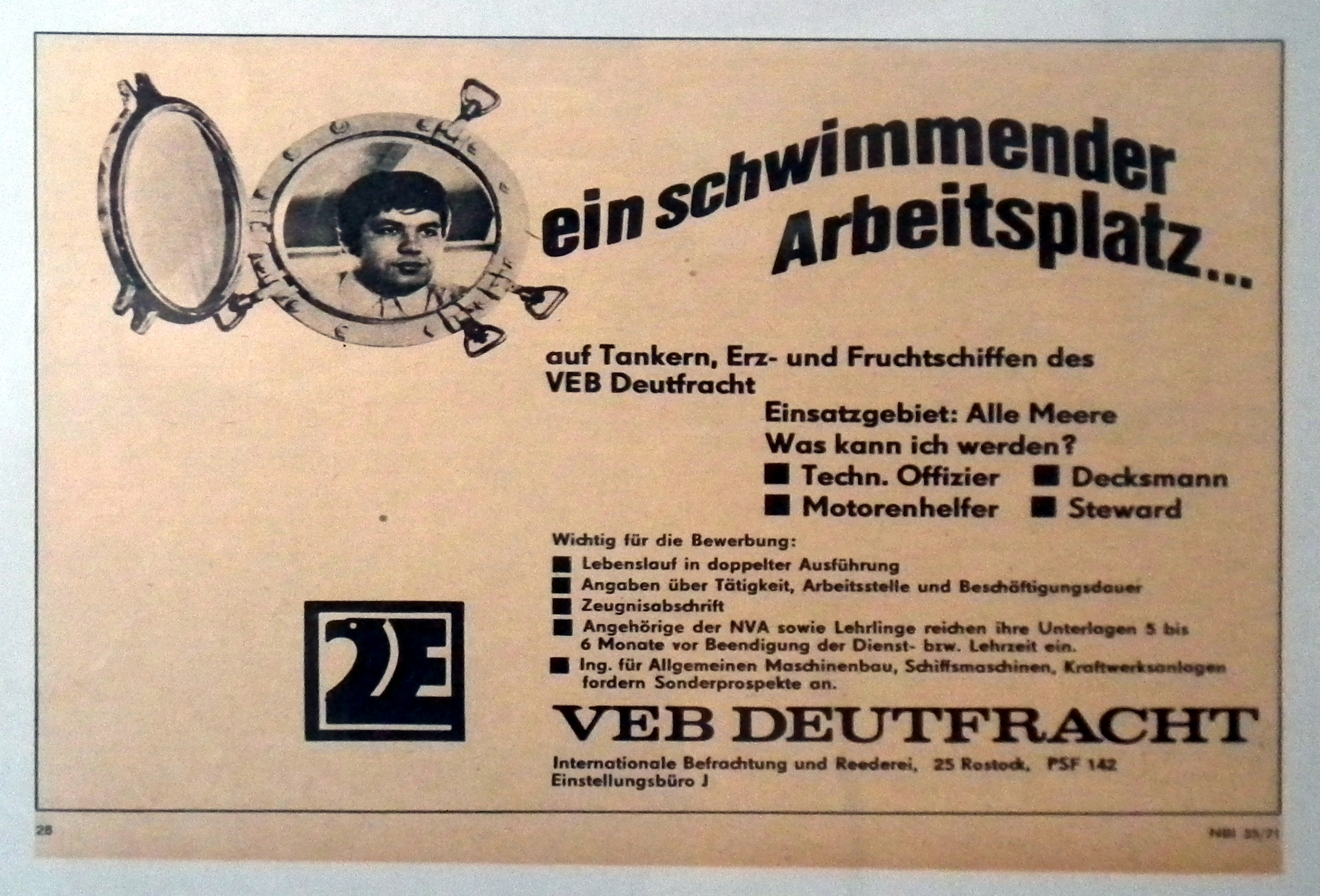 Stellenanzeige VEB DEUTFRACHT, DDR-Museum Pirna, Veröffentlicht mit Genehmigung der Museumsleitung